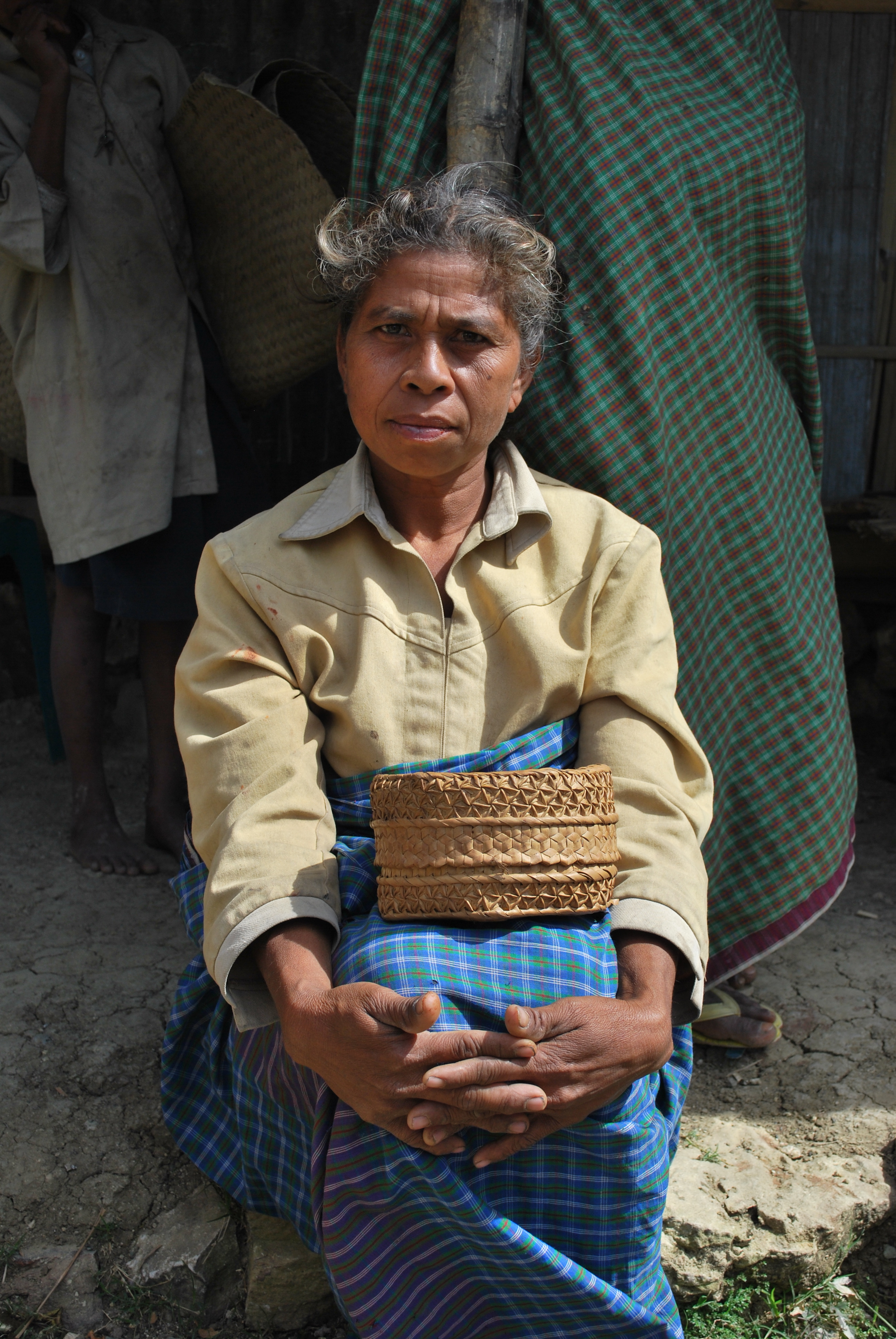 Frau mit Korb in Venilale